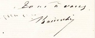 Signature Felix Baciochi